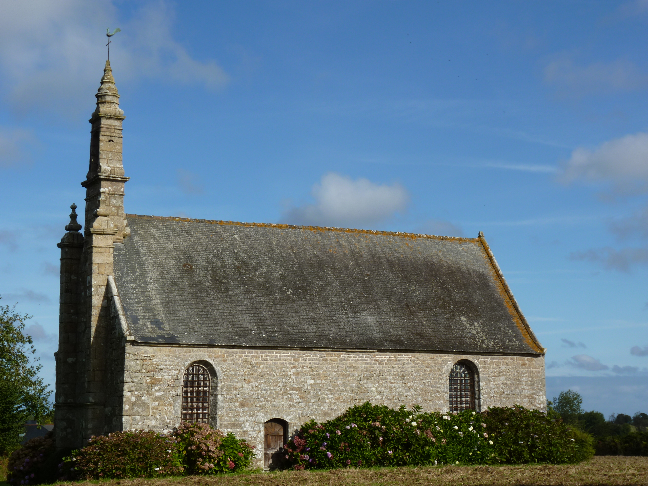 Petite chapelle du 18ème siècle